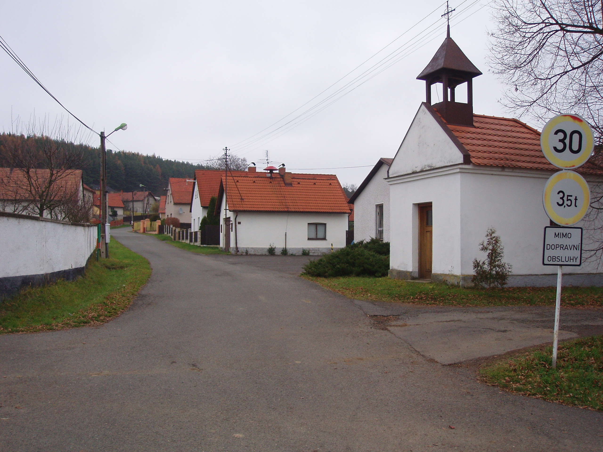 Obec Skalice poblíž Nečíně